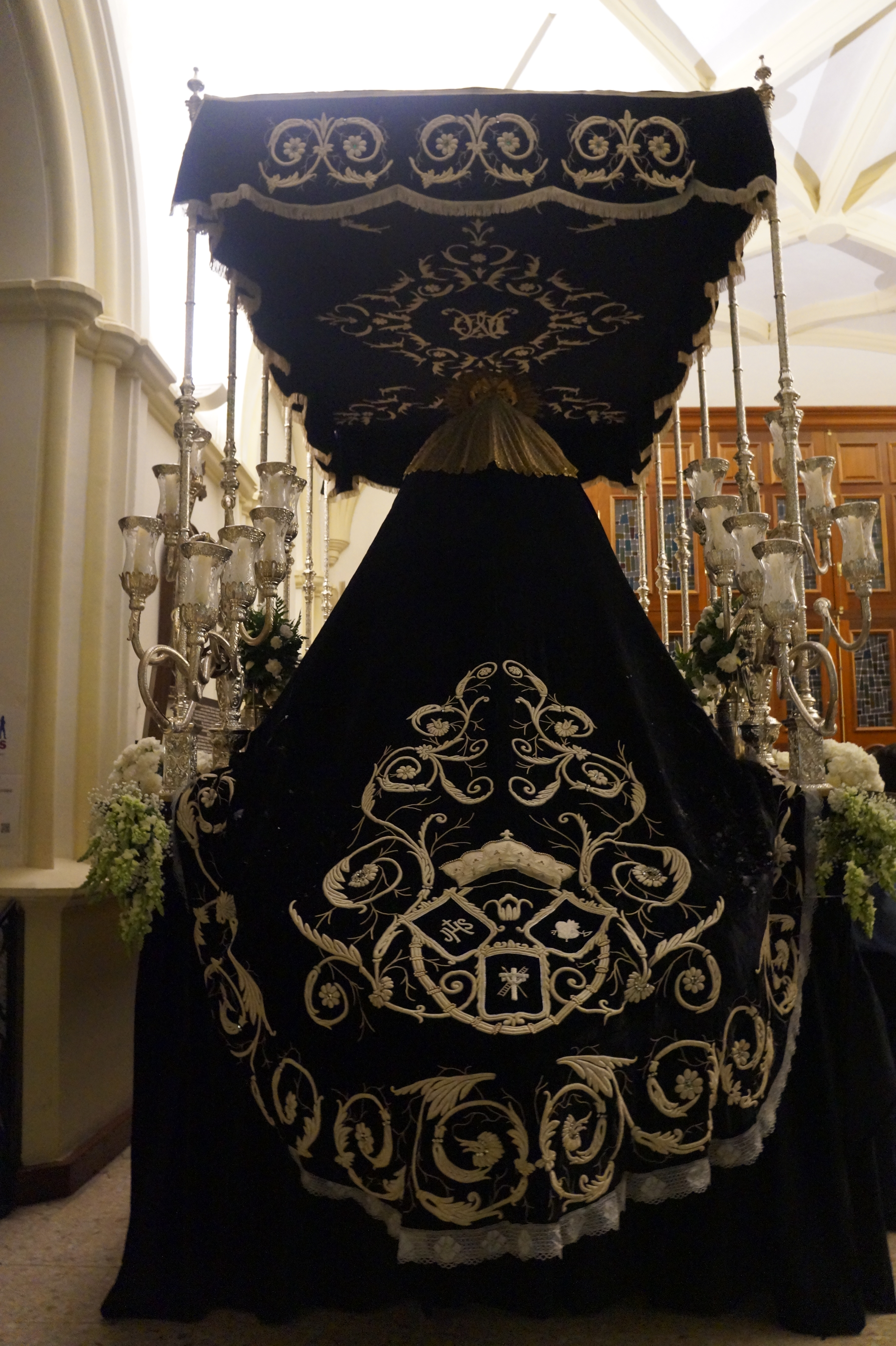 Mayor Dolor Badajoz 2015